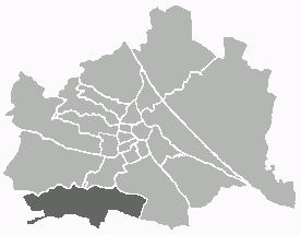 Positionskarte des 23. Wiener Gemeindebezirks Unter Verwendung einer Vorlage von Extrawurst. Public Domain.